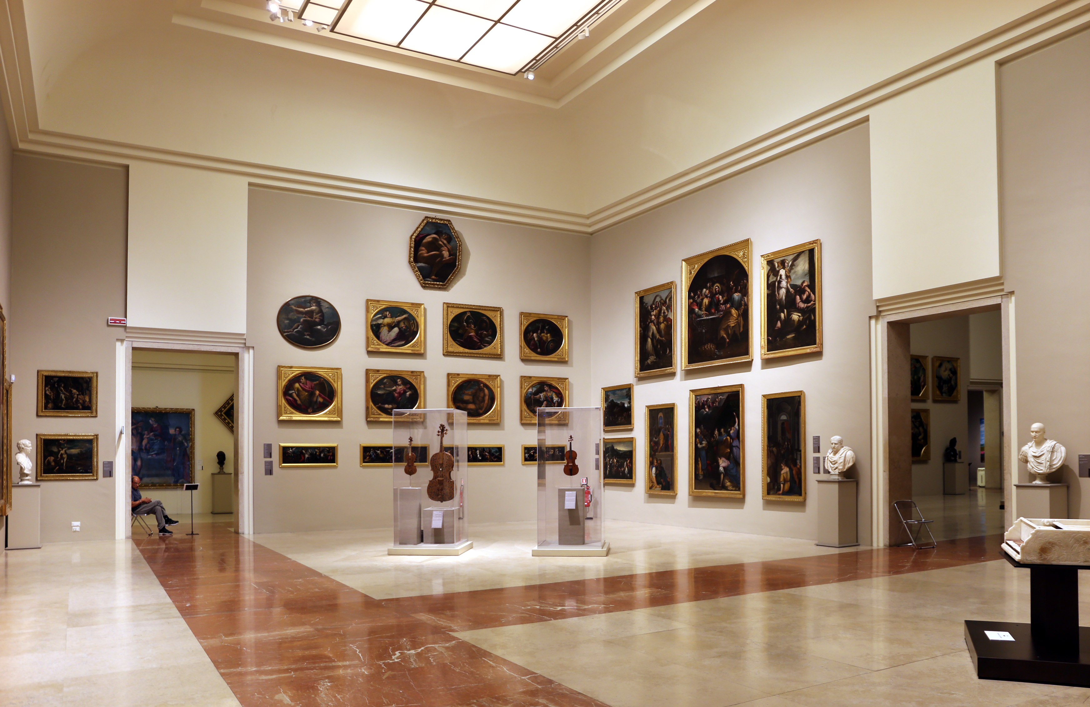 Palazzo dei musei This is a photo of a monument which is part of cultural heritage of Italy.